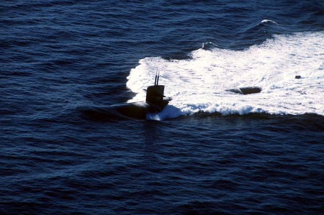 USS Omaha (SSN-692) underway